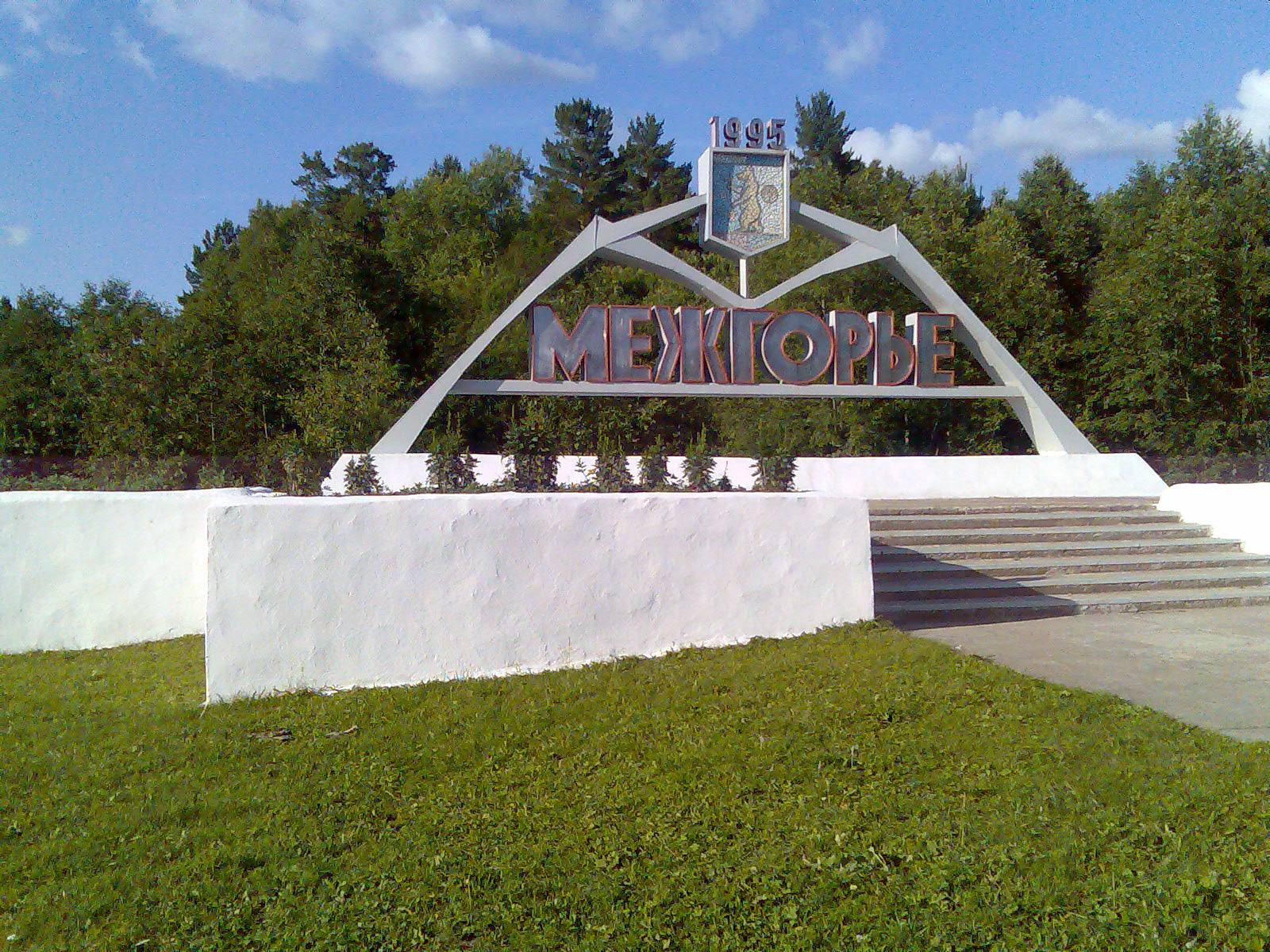 Памятник